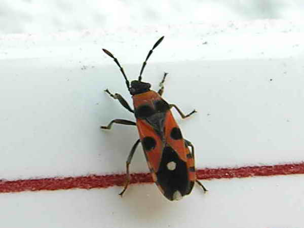 Foto tirada cunha Nikon E8800 Bastabales - Galicia - Spain